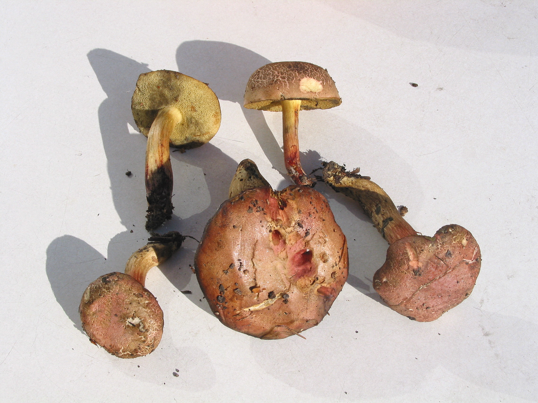 Boletus chrysenteron ou/or Xerocomus chrysenteron, Havré (Belgique/Belgium), bois de hêtres et de chênes./ beeches and oaks wood.